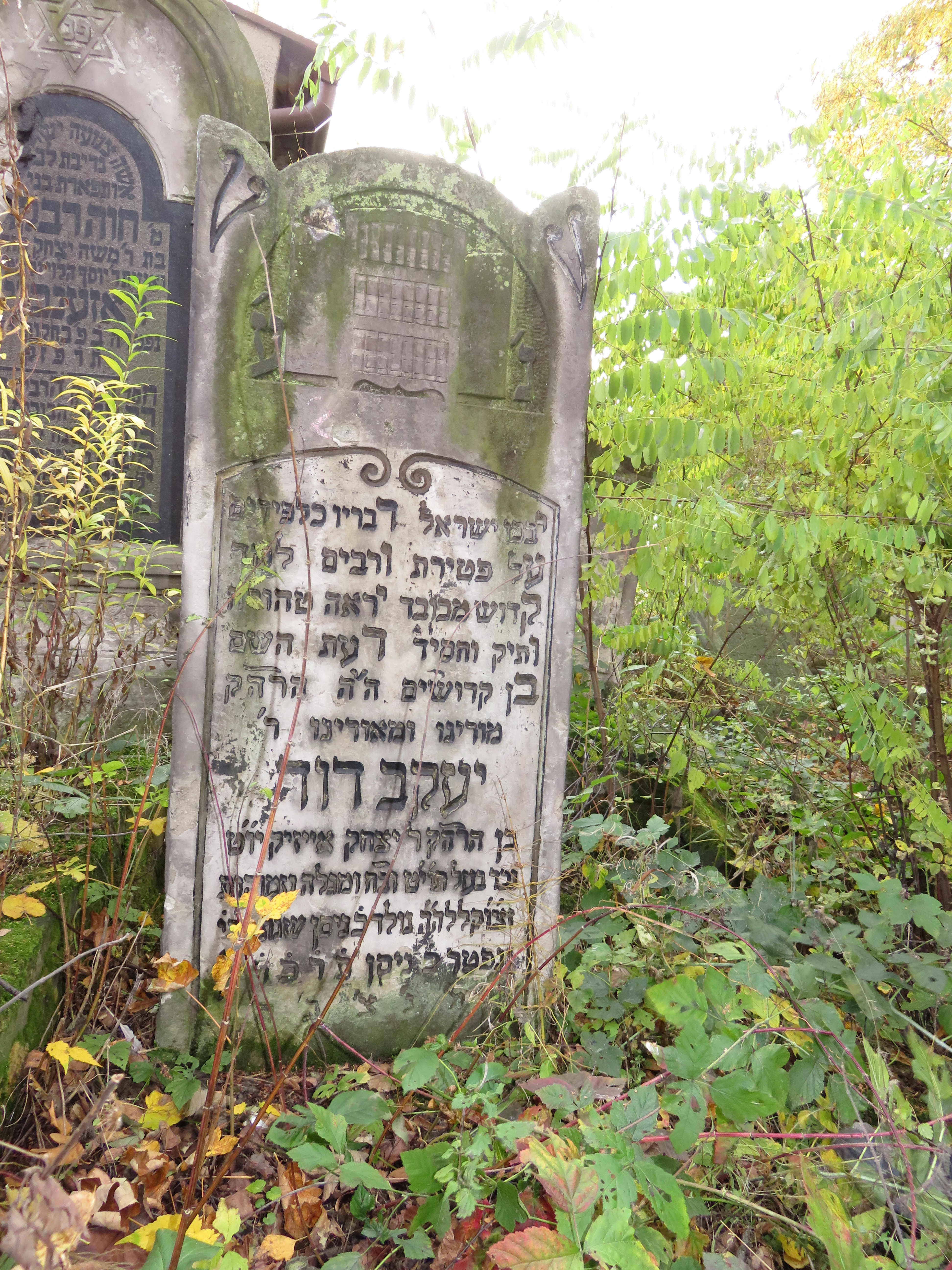 קבר רבי יעקב דוד וינטרוב. רדומסק (2).jpg